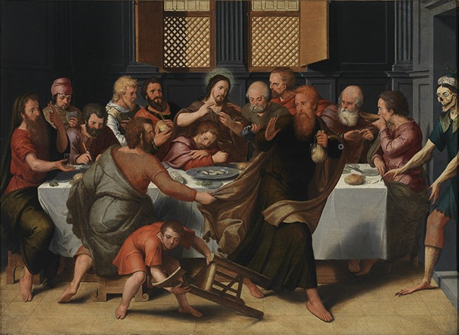 Laatste Avondmaal (Pieter Pourbus, 1548); collection: Musea Brugge - Groeningemuseum